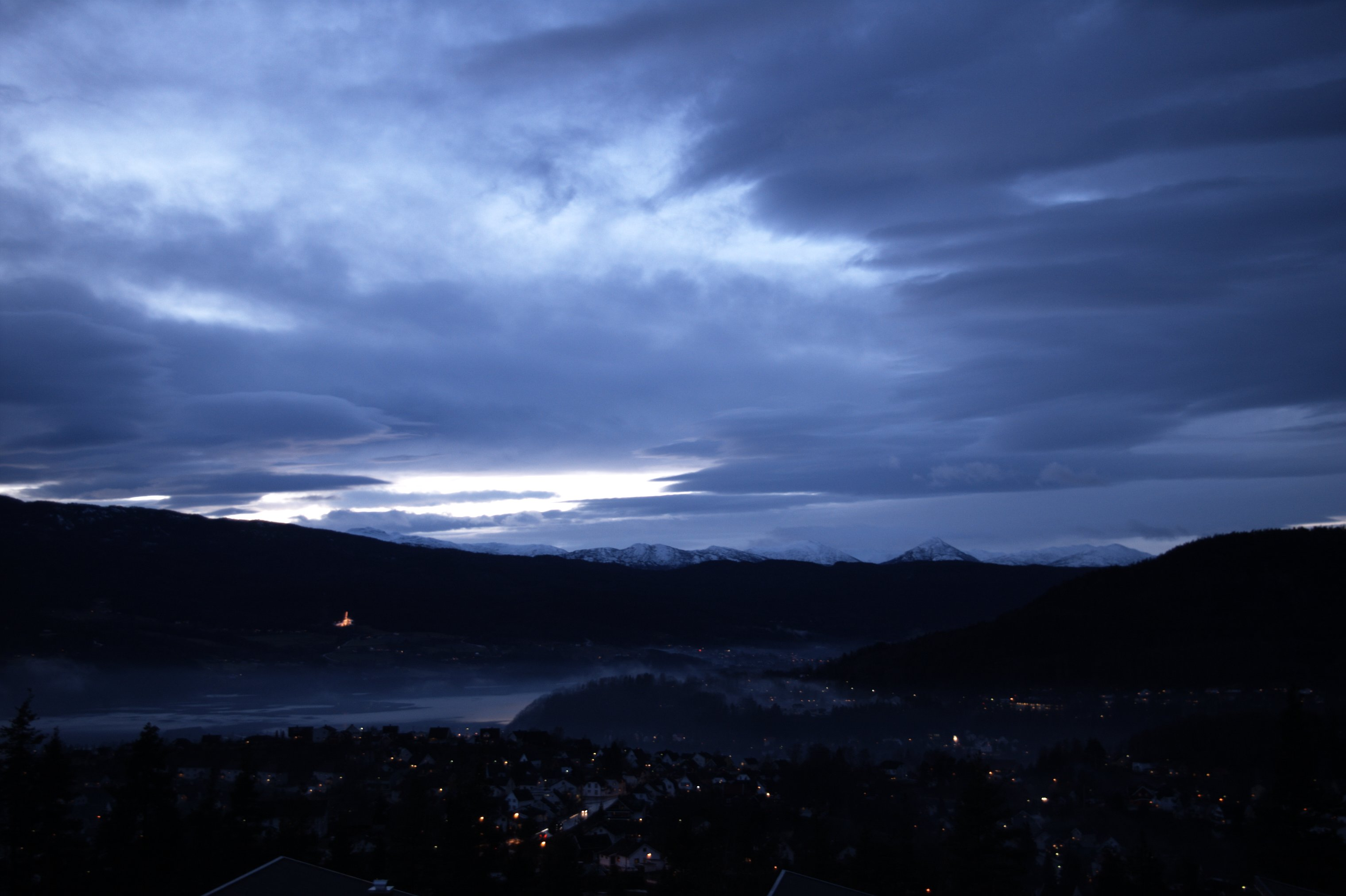 Notodden city